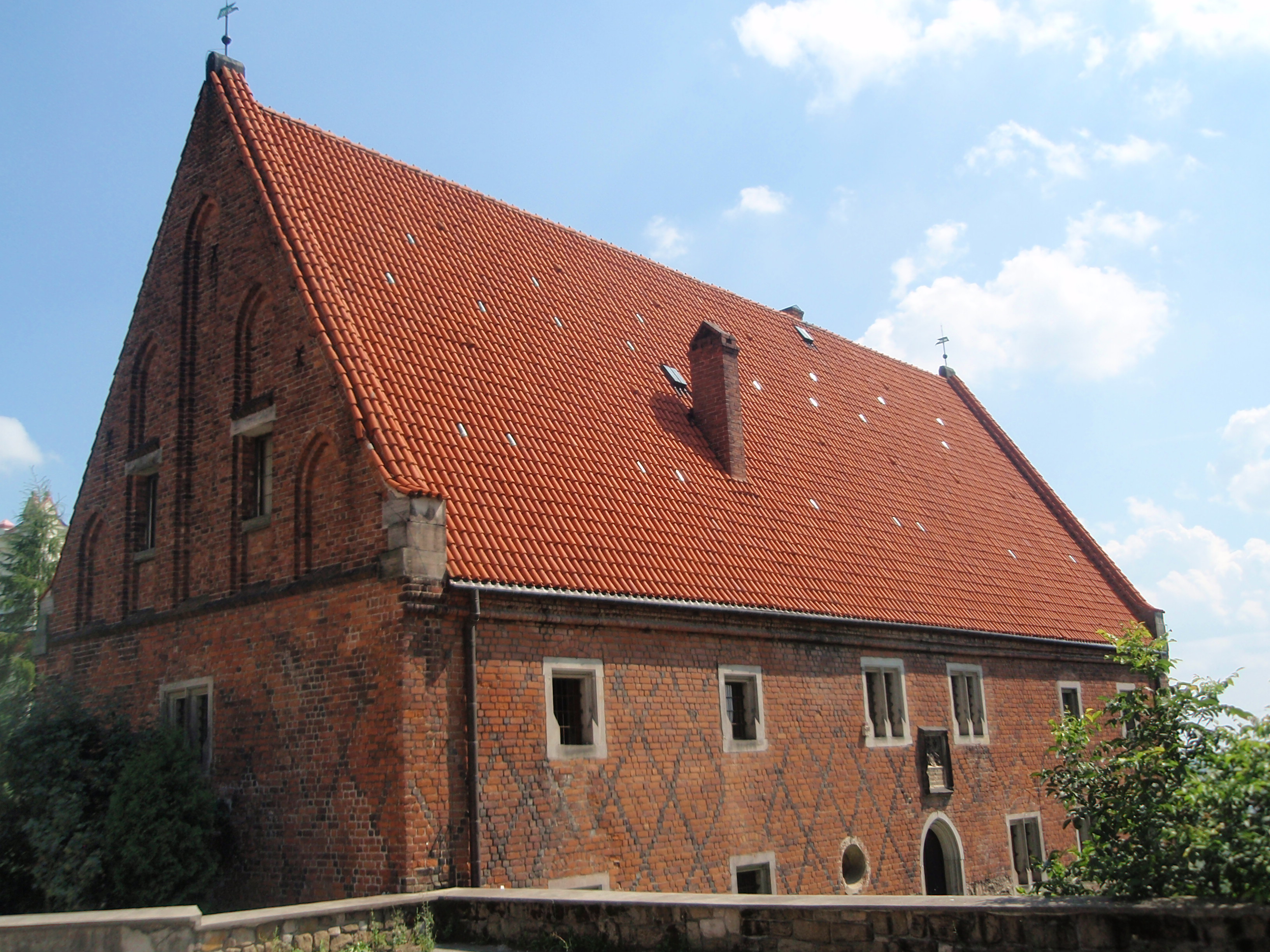 Dom Jana Długosza w Sandomierzu